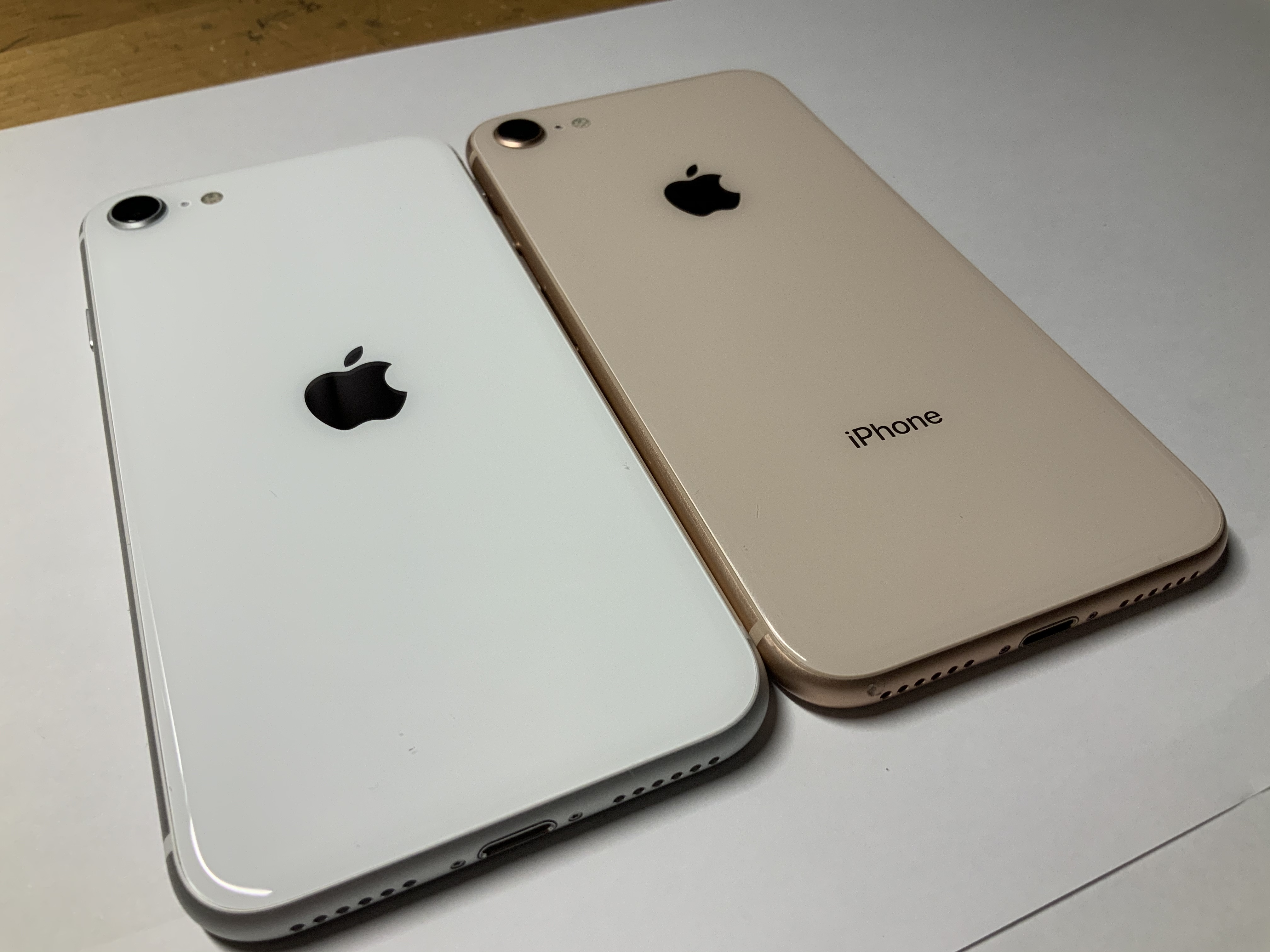 iPhone SE(第2世代)とiPhone 8を比較